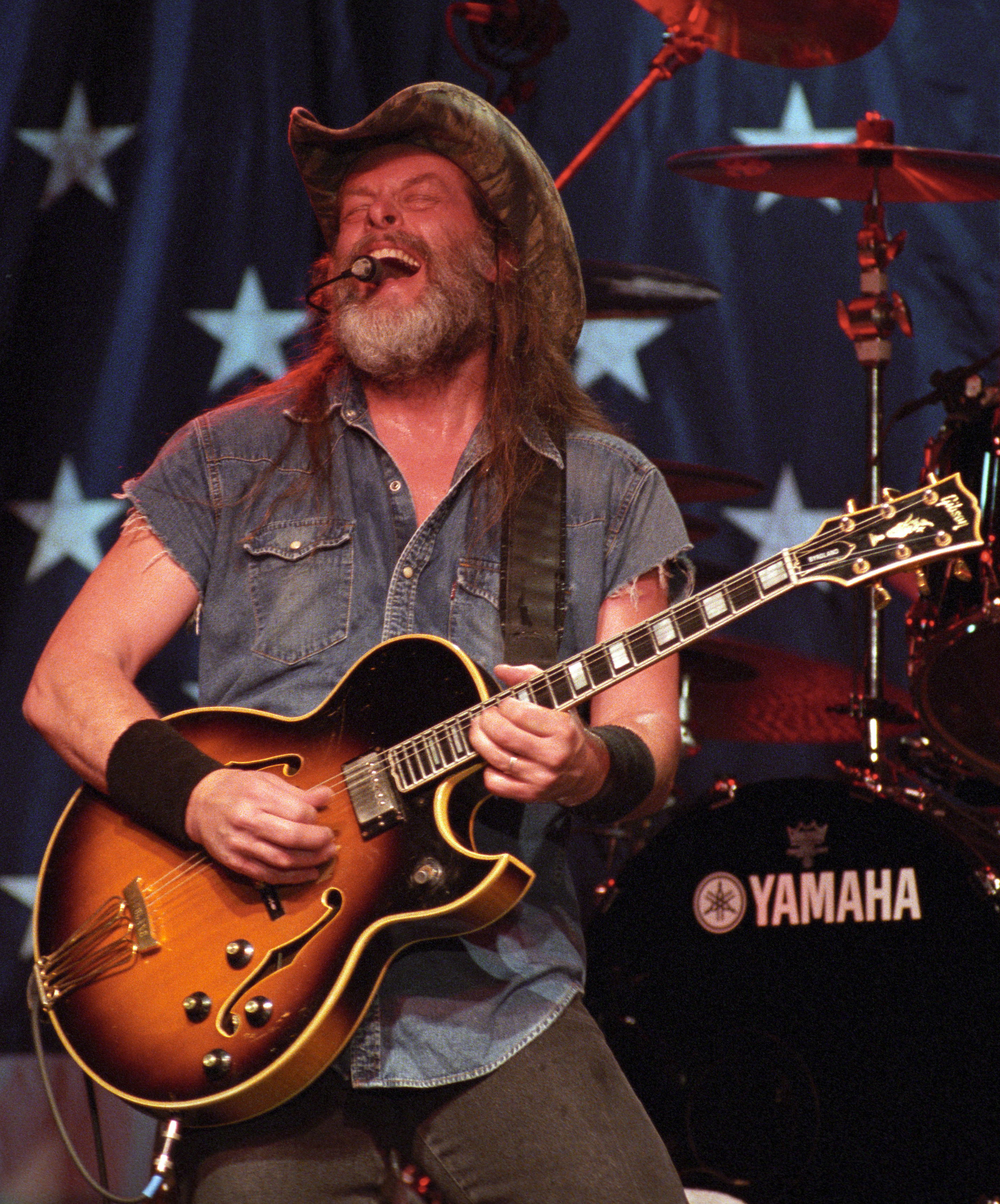 Ted Nugent